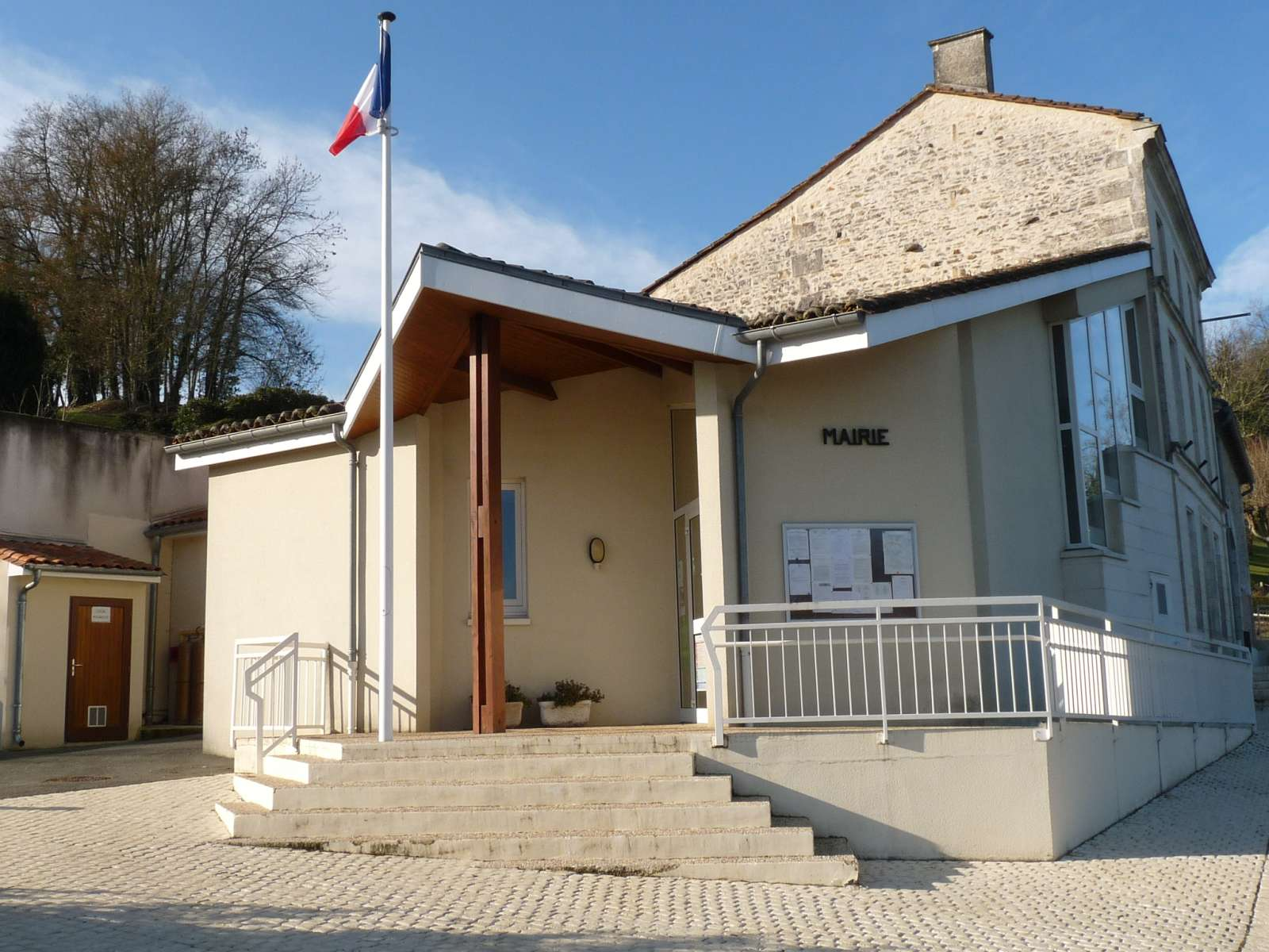 mairie de Feuillade, Charente, France